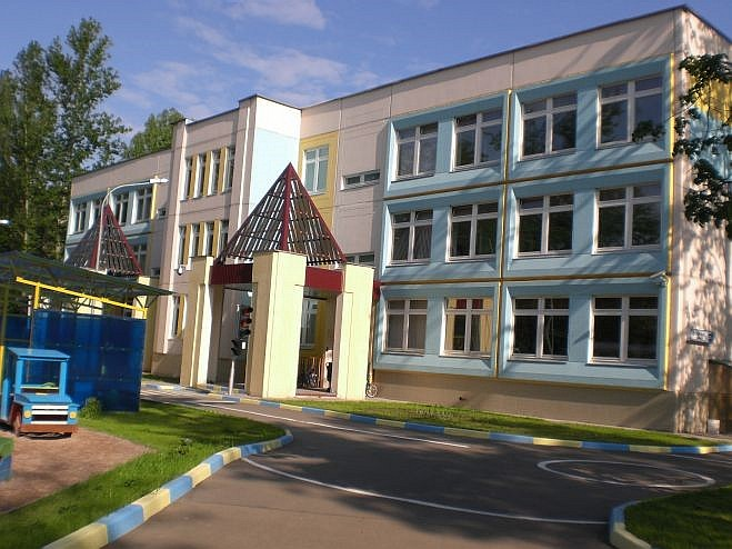 Детский сад № 1760 (2-ой корпус). Перово. Москва